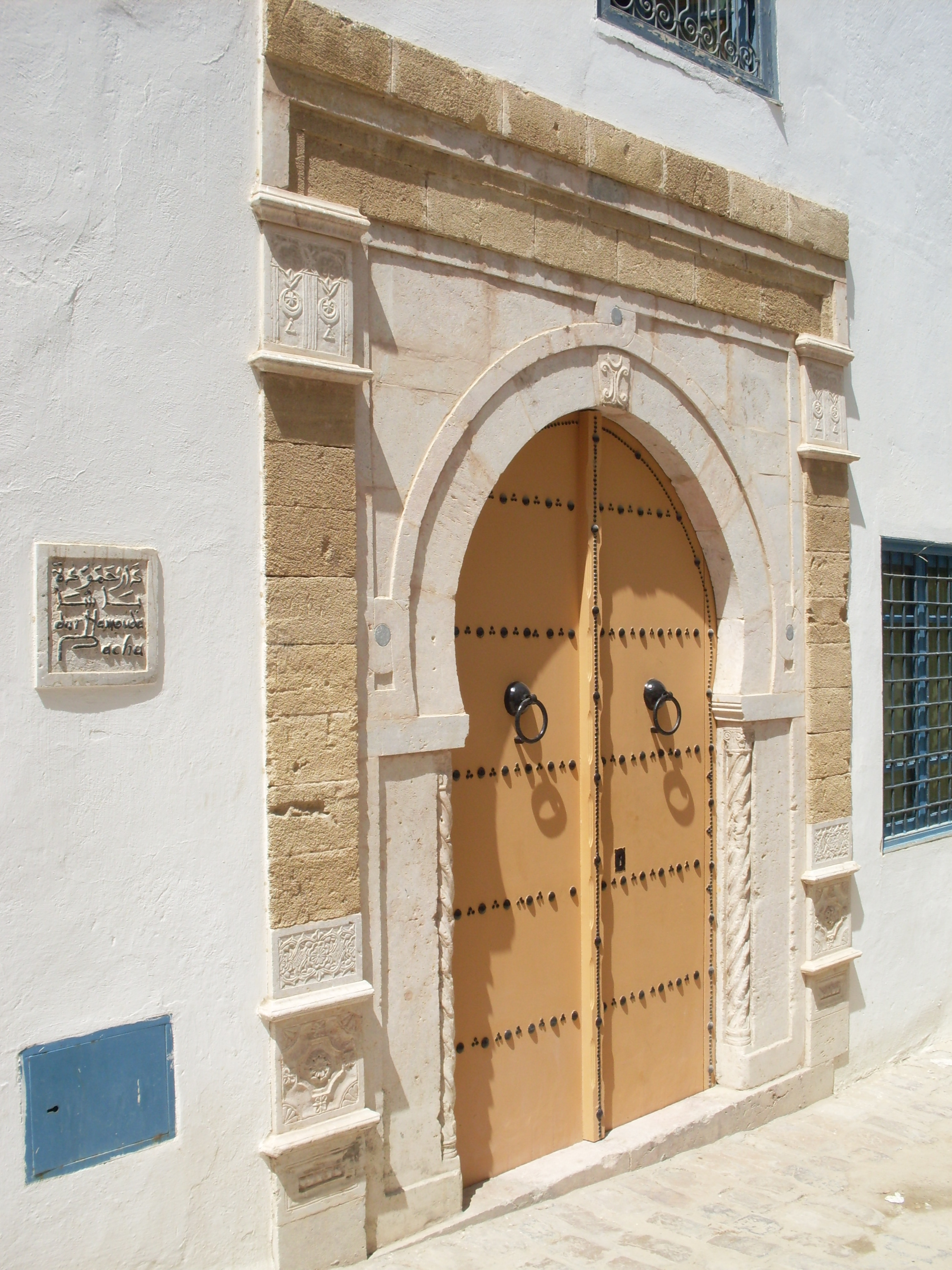 Medina de Tunis, une des portes de la maison Hammouda Pacha